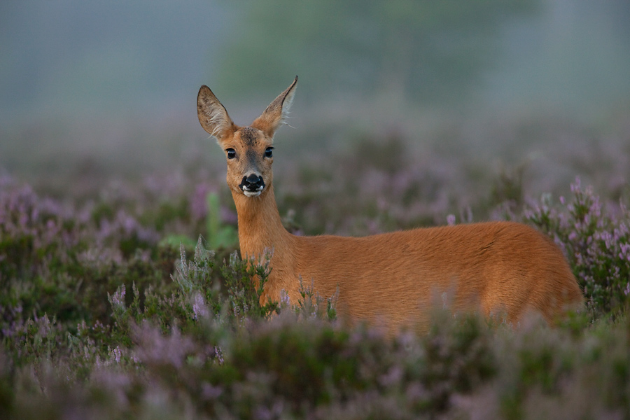 Capreolus capreolus